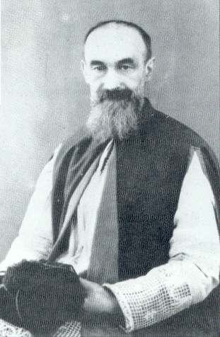 Mgr Evrard en prélat de Sa Sainteté